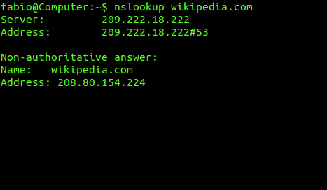 nslookup command